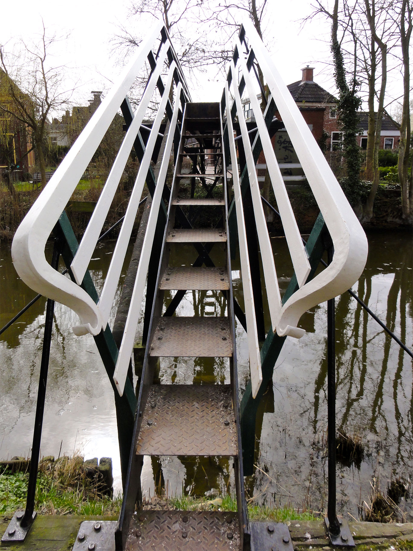 Monumentale brug in Baflo